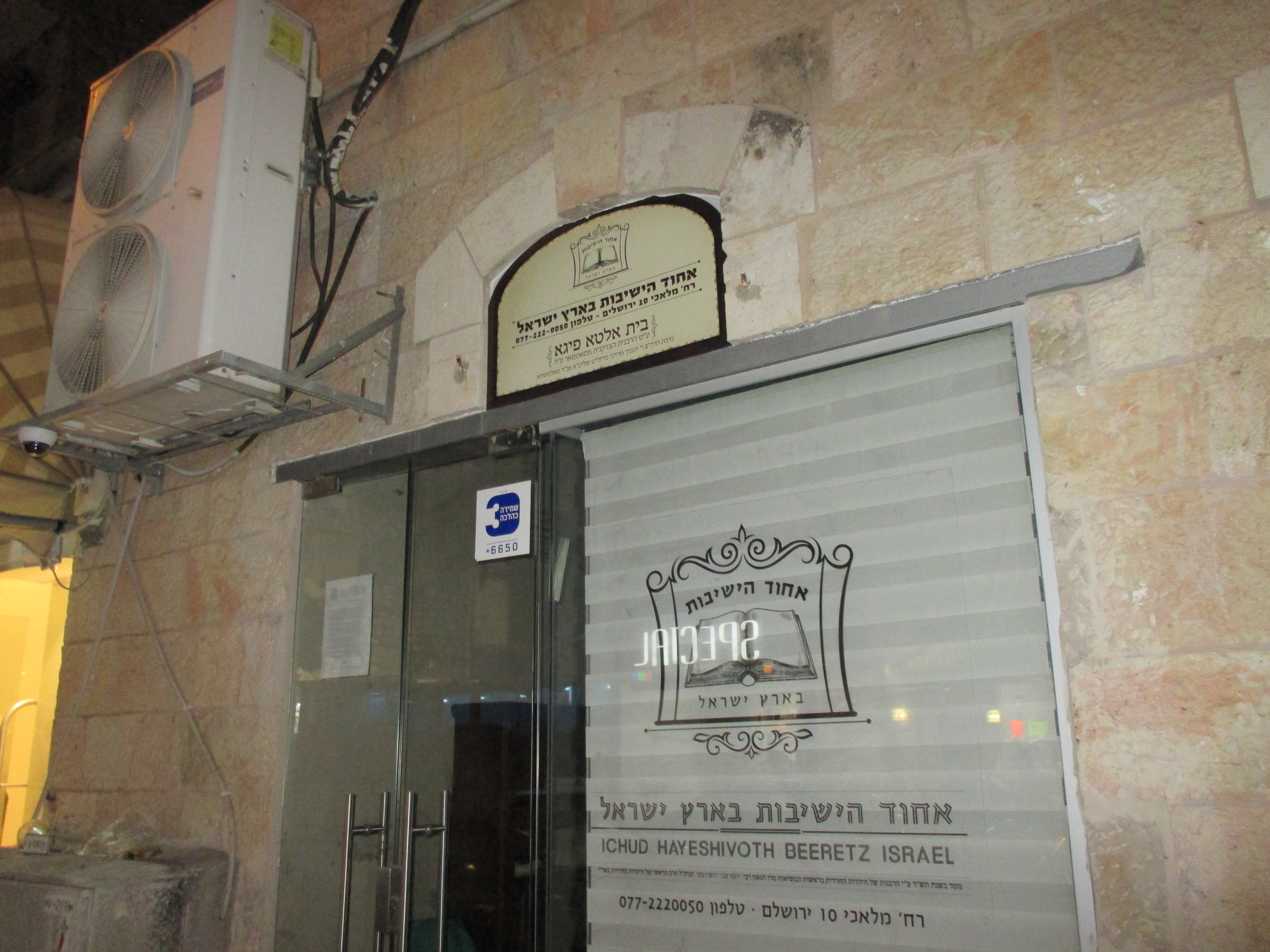 משרדי איחוד הישיבות ברחוב מלאכי בירושלים